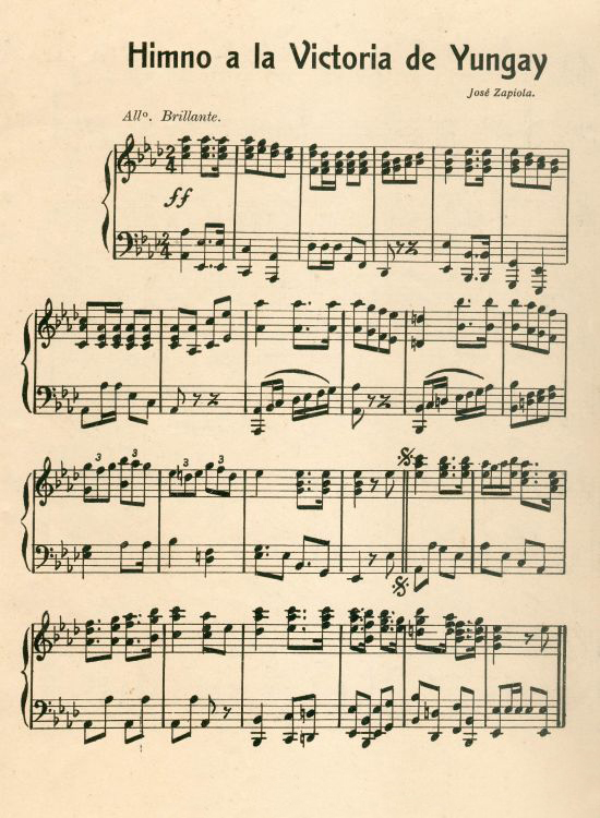 El Himno de Yungay se compuso en honor a la batalla del mismo nombre desarrollada en el Cerro Pan de Azúcar de la Provincia de Yungay, Perú, en la cual la unión del Ejército de Chile, al mando del general chileno Manuel Bulnes, junto al Ejército Restaurador del Perú dirigido por el peruano Agustín Gamarra, vencen a las fuerzas de la Confederación Perú-Boliviana lideradas por el boliviano Andrés de Santa Cruz. Compuesto en 1839, con música de José Zapiola y letra de Ramón Rengifo, fue considerado por mucho tiempo (hasta la segunda mitad del siglo XX) casi un segundo himno nacional en Chile por su popularidad.